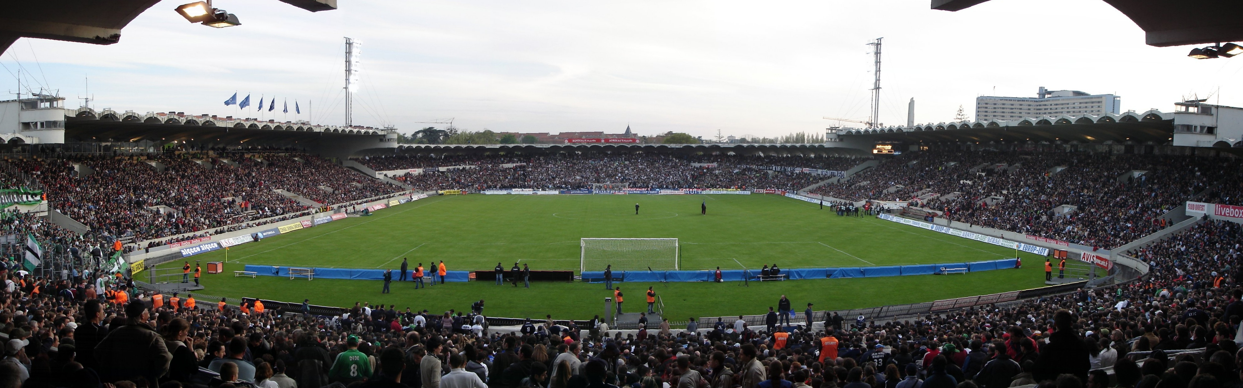 Panorama du stade des Girondins de Bordeaux